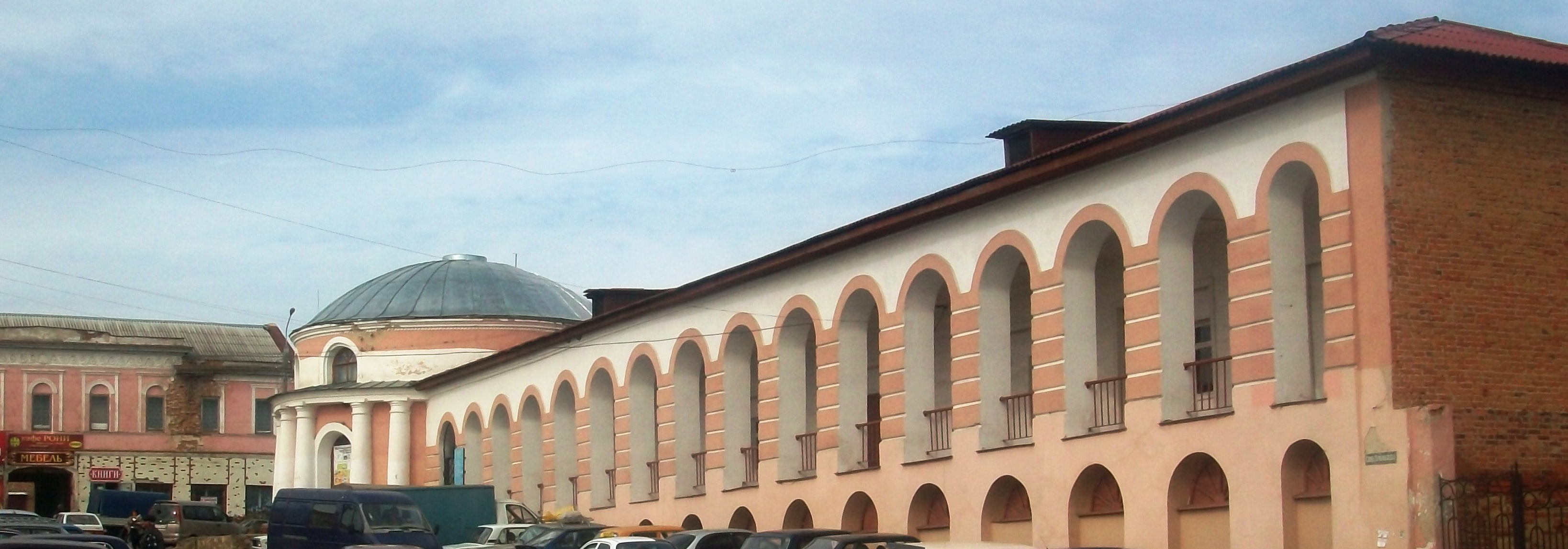 Музей истории Рыльского авиаколеджа и наследия Г. И. Шелехова